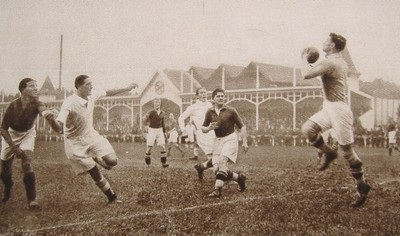 Photo du match opposant l'Olympique lillois (football) à l'l'Olympique de Marseille au Stade Henri-Jooris le 11 septembre 1932